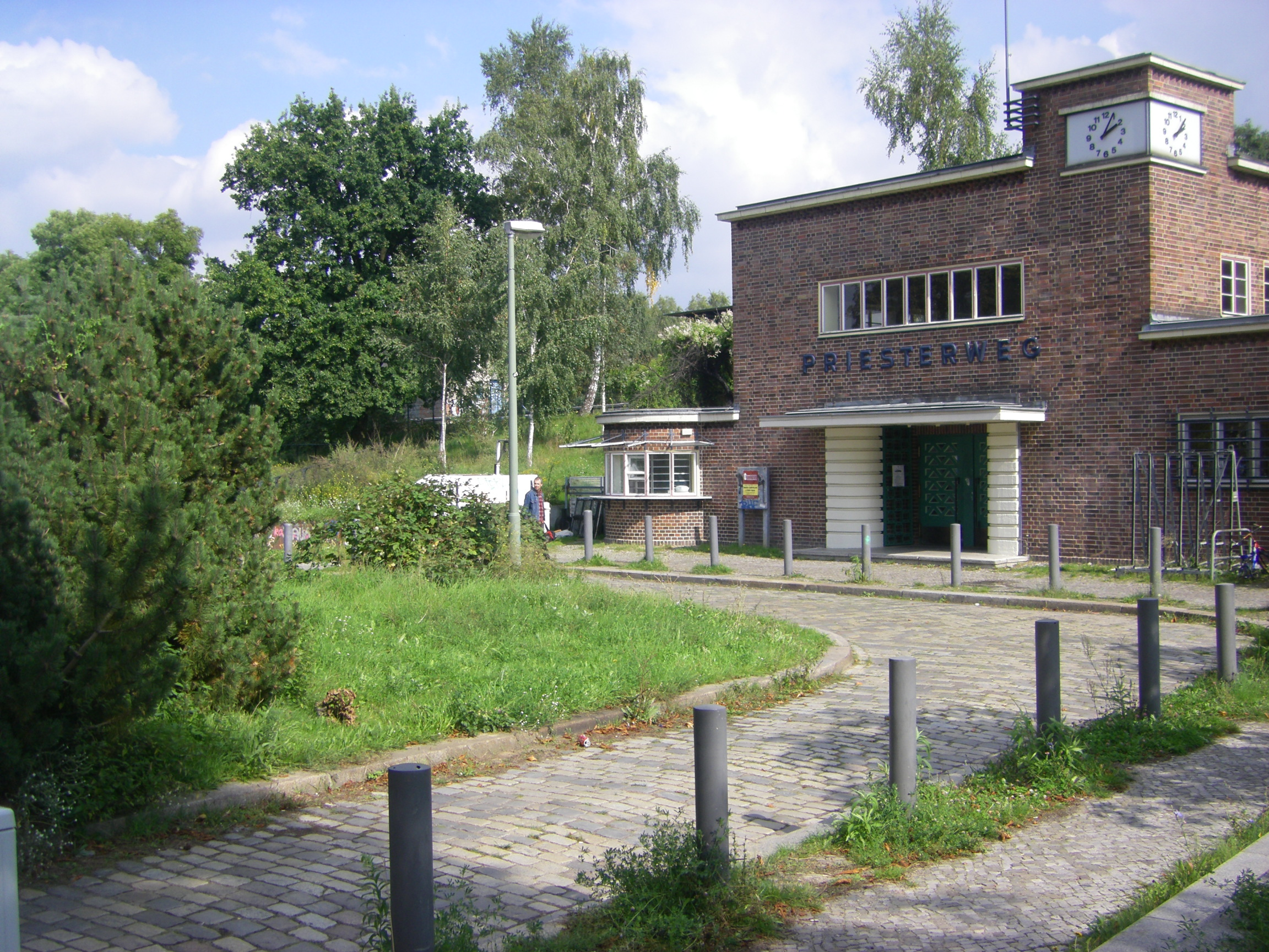 Berlin S-Bahnhof Priesterweg Alter_Eingang